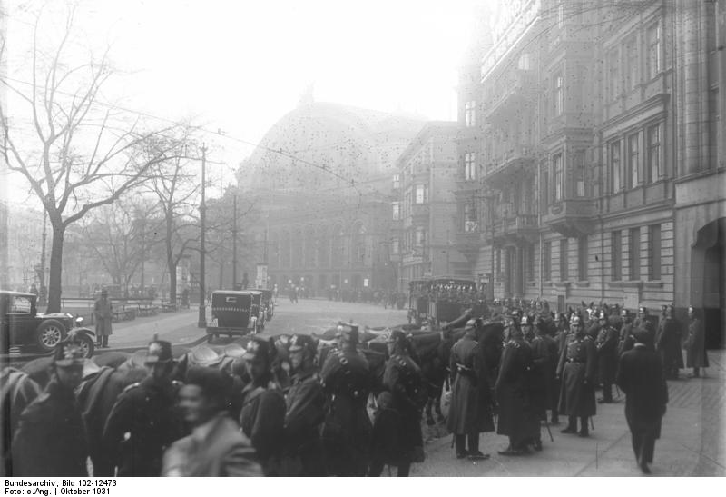 Die Ankunft des italienischen Aussenministers Grandi auf dem Anhalter Bahnhof in Berlin! Polizei sichert den Anhalter Bahnhof währen der Ankunft des italienischen Aussenministers Grandi